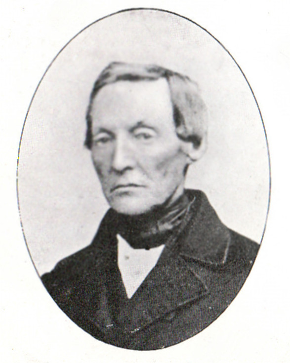 Hans Christian Tørsleff